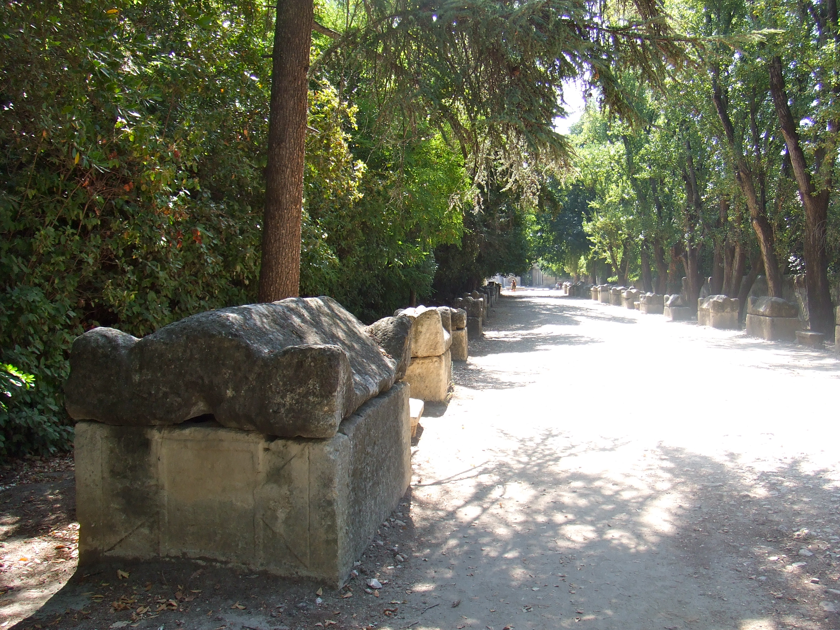 Les Alyscamps à Arles, Bouches-du-Rhône, allée .